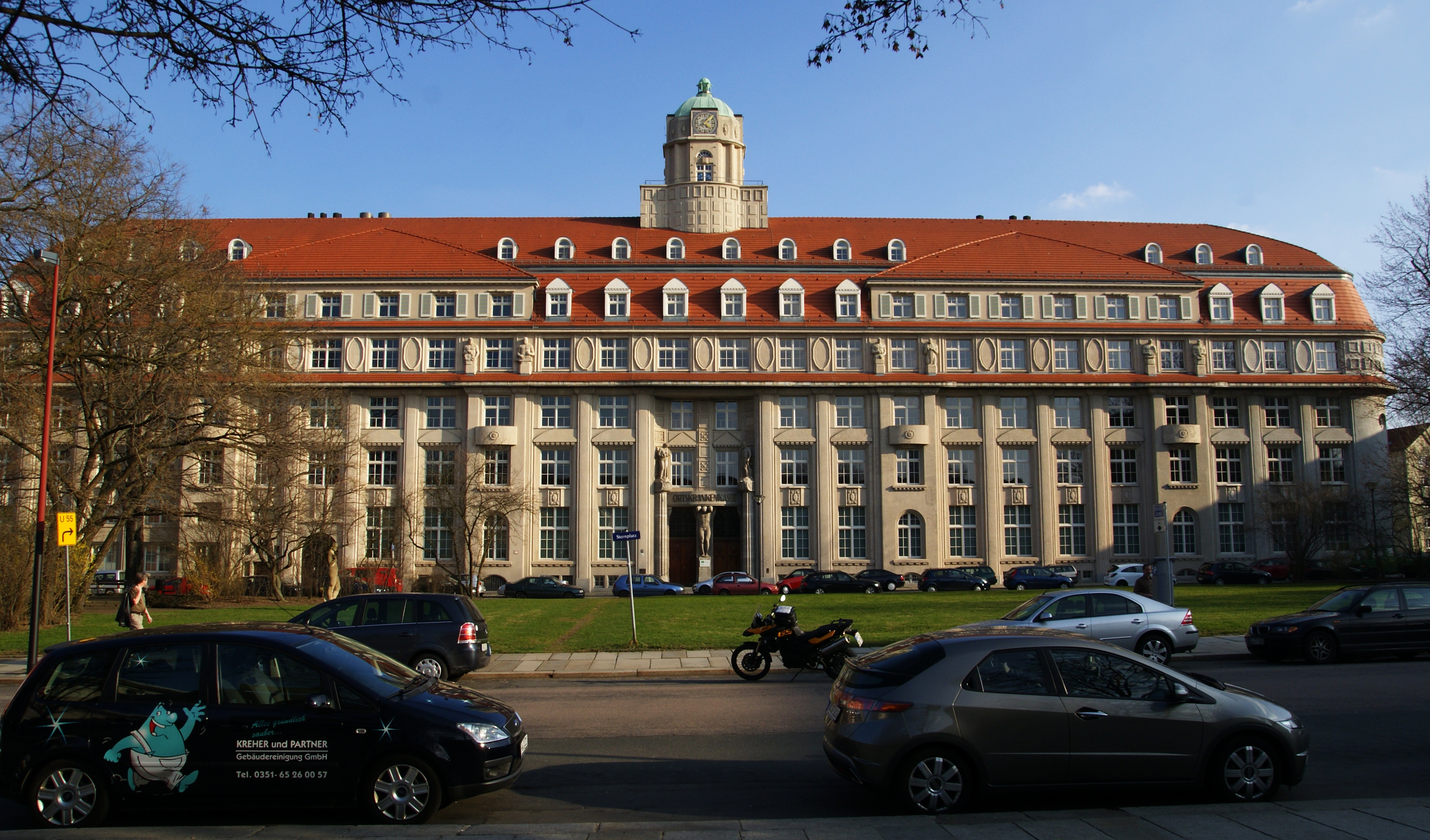 Hauptgebäude Ortskrankenkasse Dresden, Sternplatz